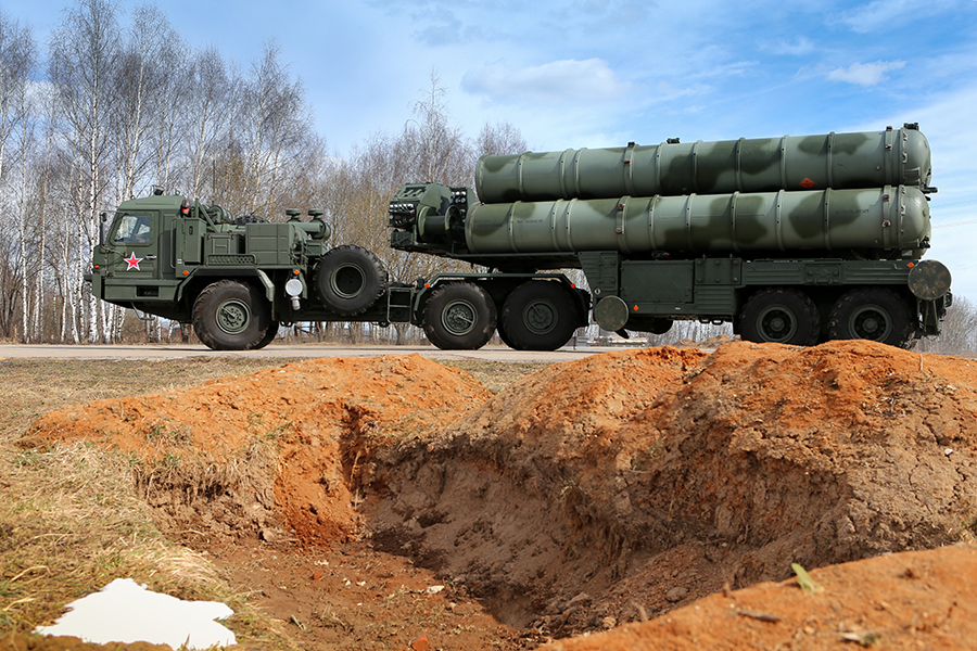 Несение боевого дежурства 4-й дивизией ПВО (г. Долгопрудный).